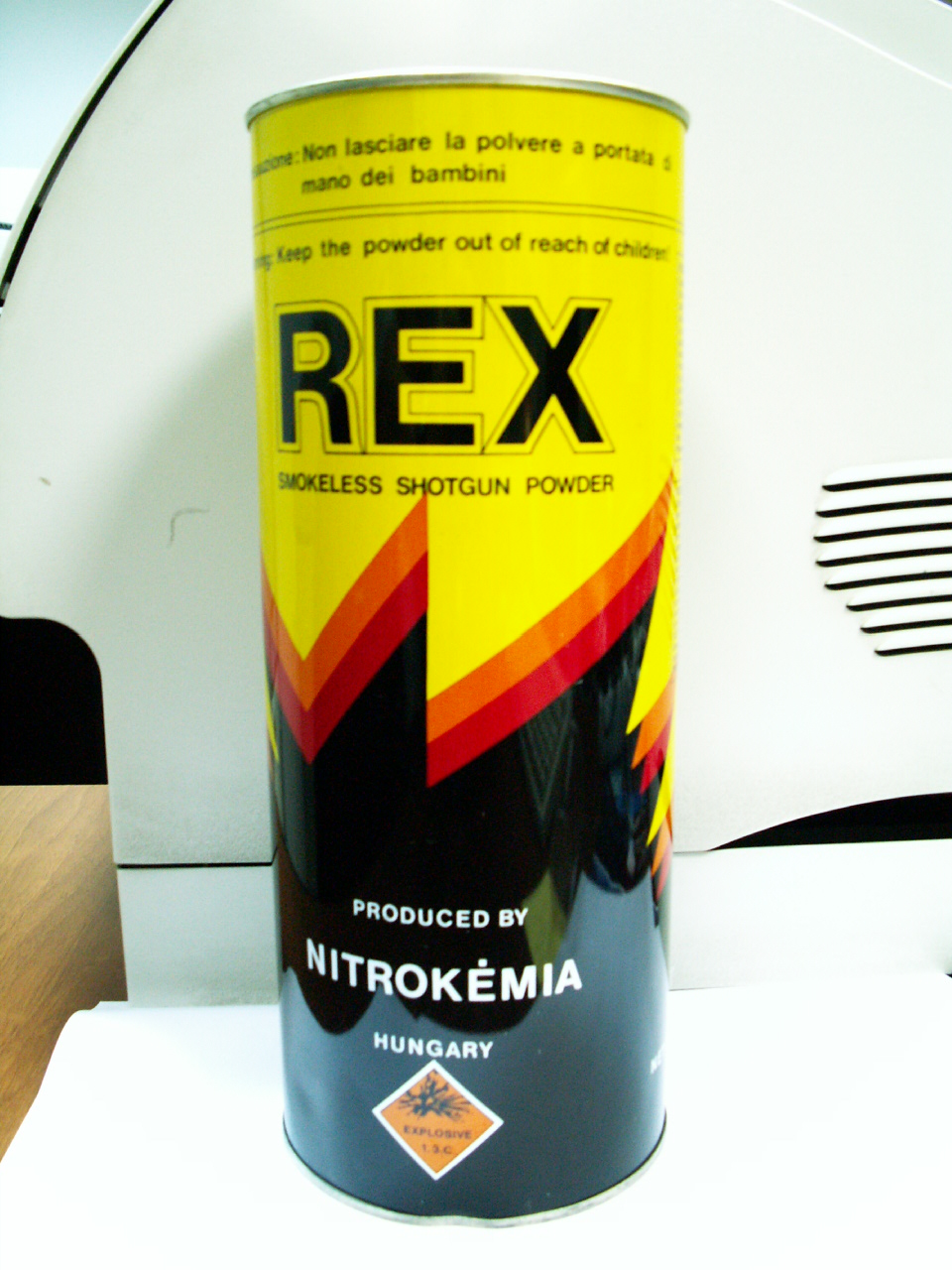 Madžarski brezdimni smodnik REX za šibrenice v pločevinasti embalaži, avtor: Rude